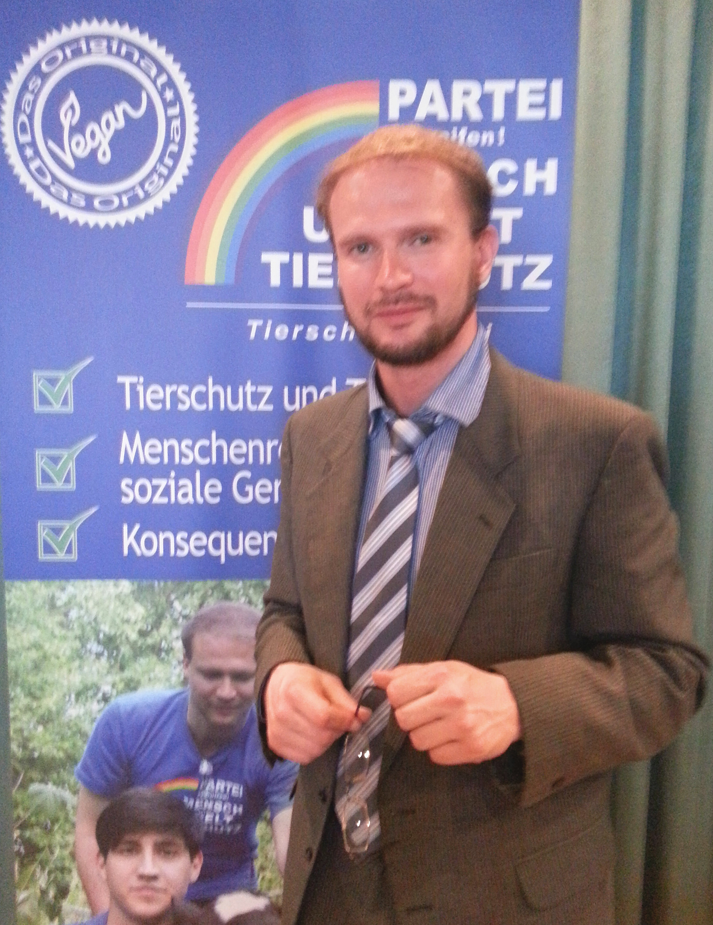 Robert Gabel, Bundesvorsitzender der Partei Mensch Umwelt Tierschutz, Listenplatz 2 zur Europawahl 2019